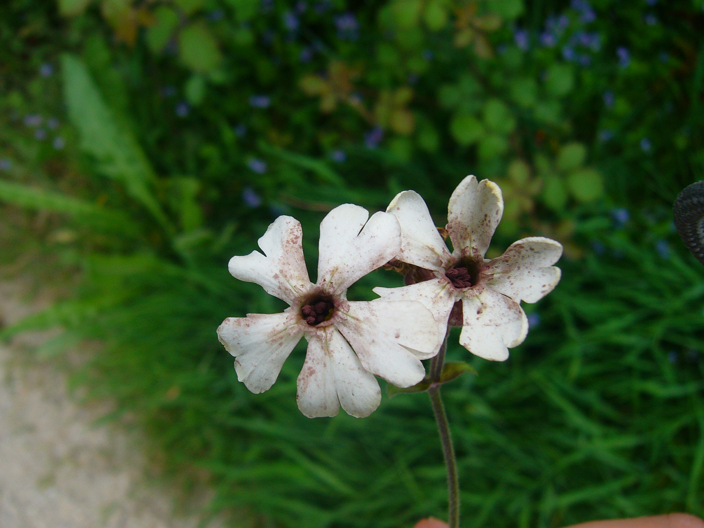 Ustilagoea in Silene alba in Mount Zapateira, Corunna, Galicia, España.